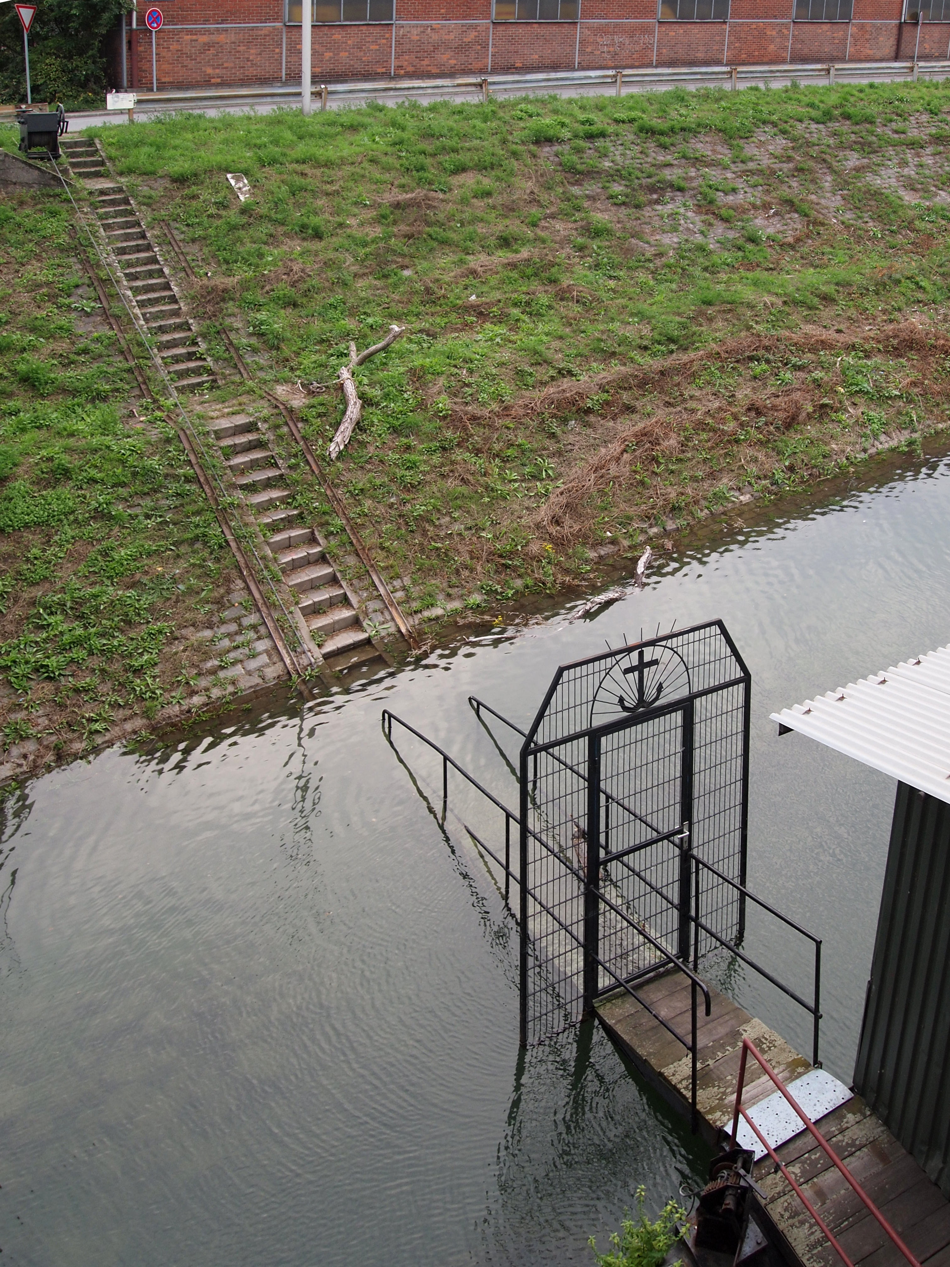 Steg für stark schwankende Wasserstände